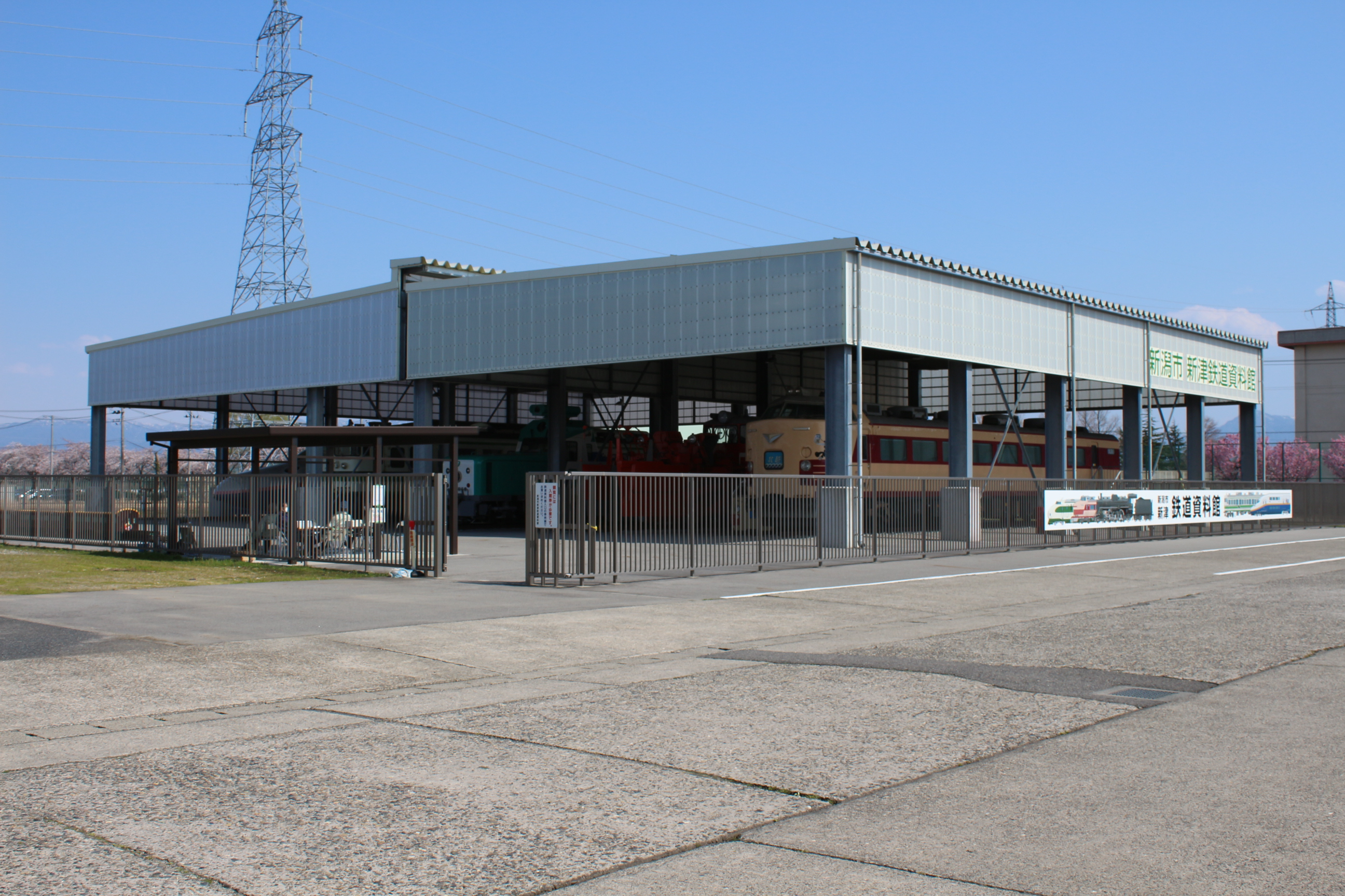 新潟市新津鉄道資料館 南側 屋外展示場